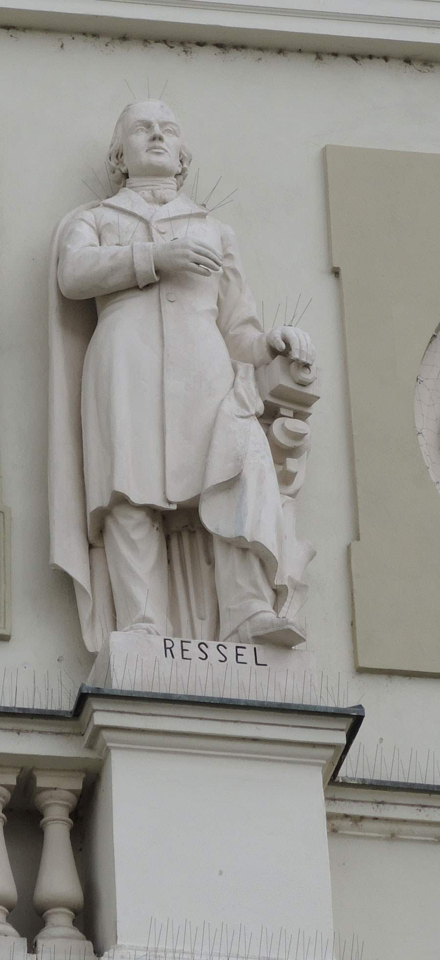 Justiční akademie, Masarykovo náměstí 183/15, Kroměříž. Josef Ressel - socha na průčelí budovy.